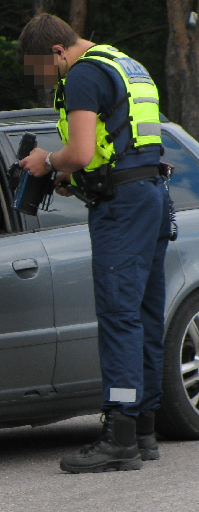 Politseinik kinnipeetud autojuhiga vestlemas. Politseiniku isiku kaitseks on nägu varjatud.